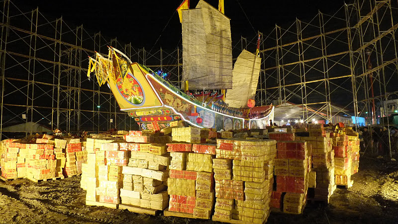 往昔，王爺之祭祀頗盛，稱為王醮，設壇祈願息災植福，每三年一次建王船，即俗稱所謂「三年一醮」。